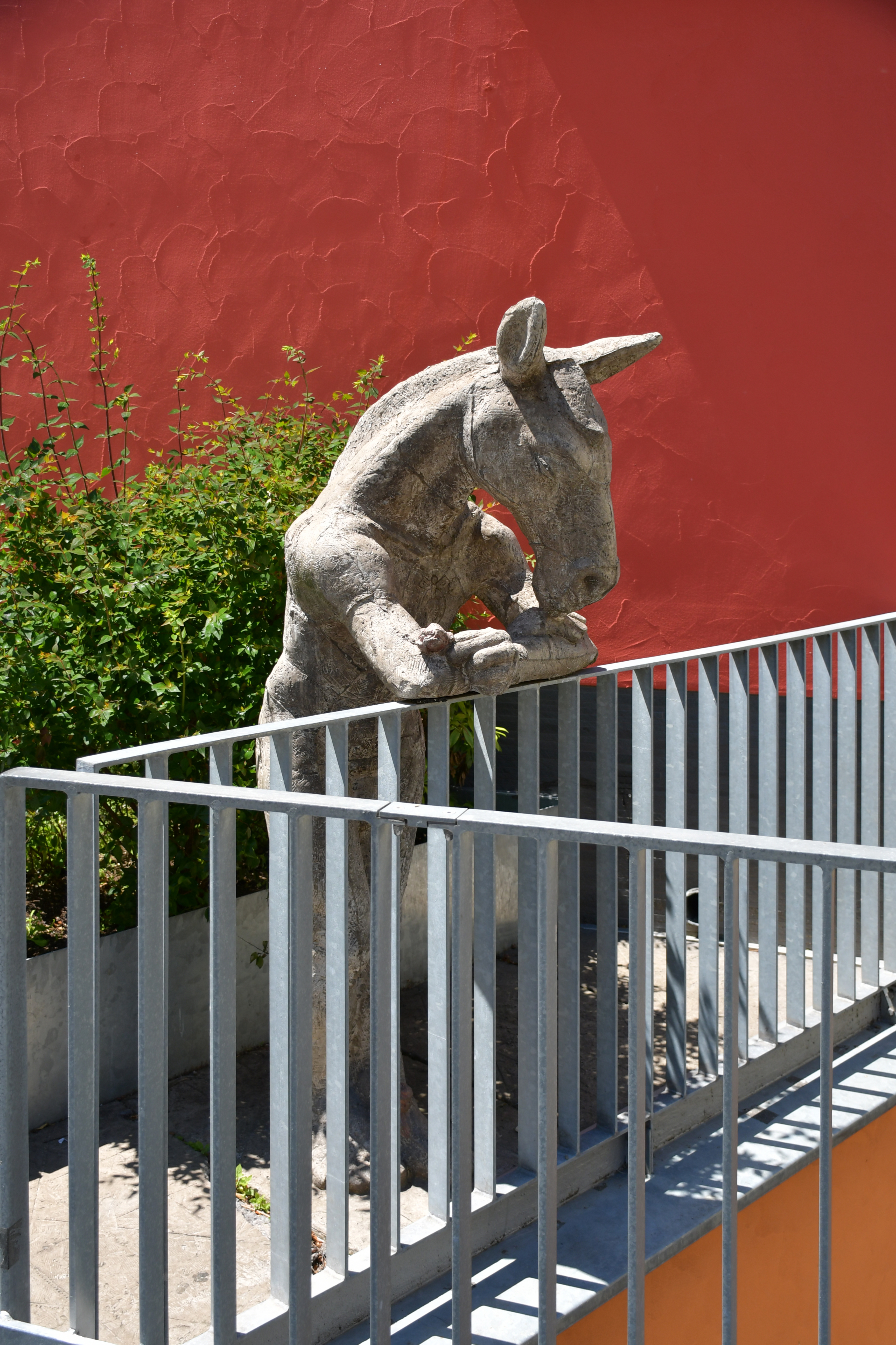 Homcheval, sculpture de 2013 en ciment polychrome de Nikola Zaric, située dans le secteur du Rôtillon, à Lausanne (Suisse).